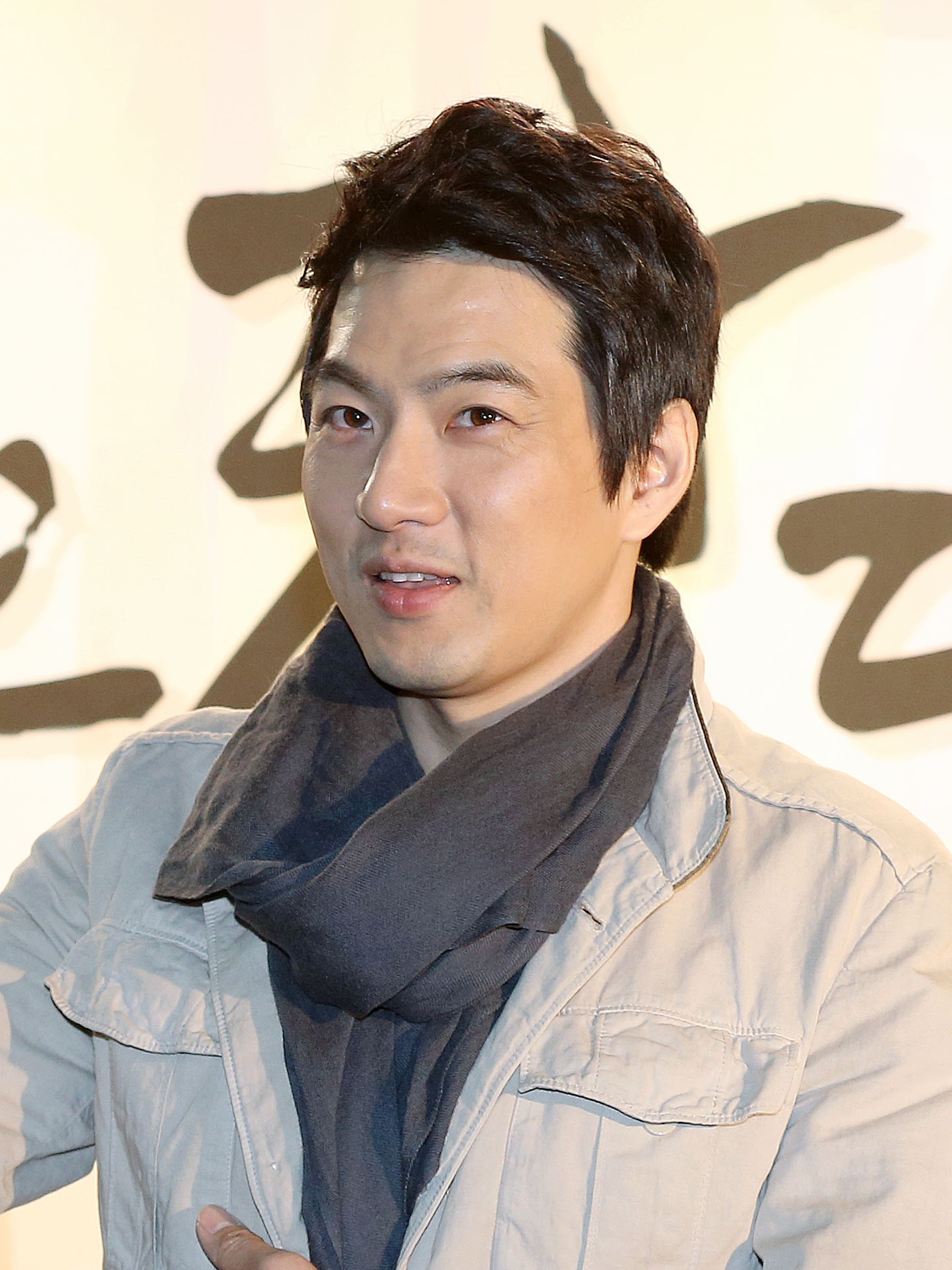 막걸리 유랑단 서경덕 성신여대 교수와 배우 송일국이 ‘막걸리 유랑단’ 행사에서 참석자들과 함께 건배를 하고 있다.